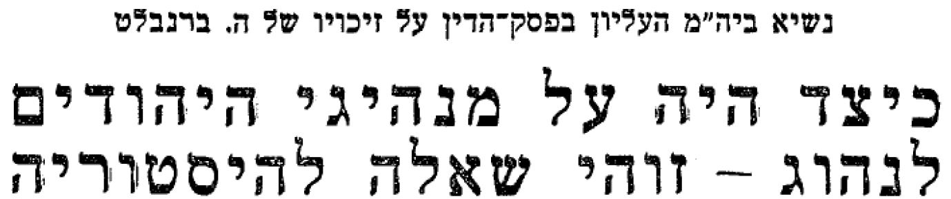 שופט בית המשפט העליון בשנת 1964 בדבר זיכויו של הירש ברנבלט